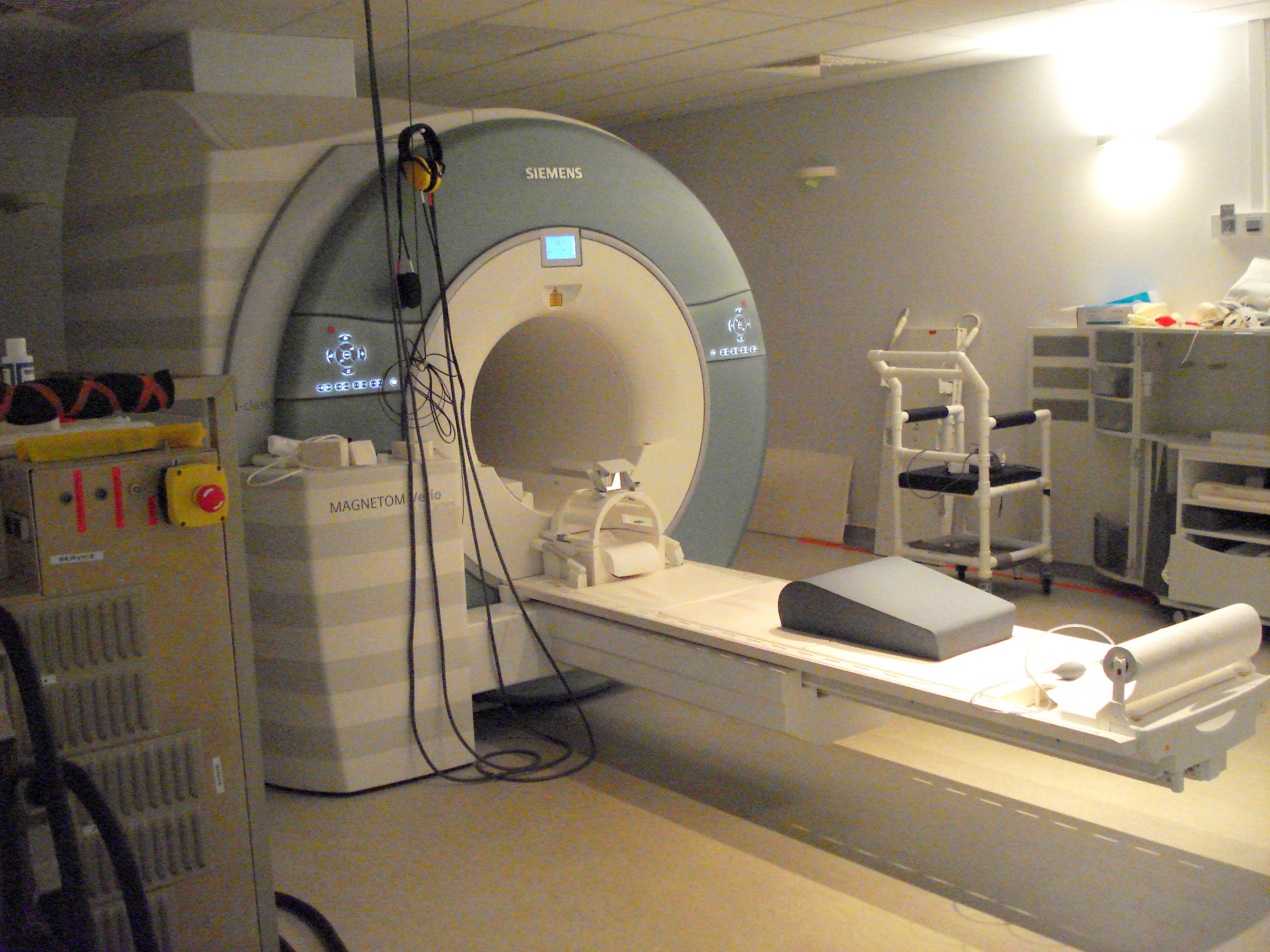 IRM Siemens à l'unité de recherche sur le cerveau et la moelle épinière, hôpital de la Pitié-Salpétrière, Paris (13e arrond.).